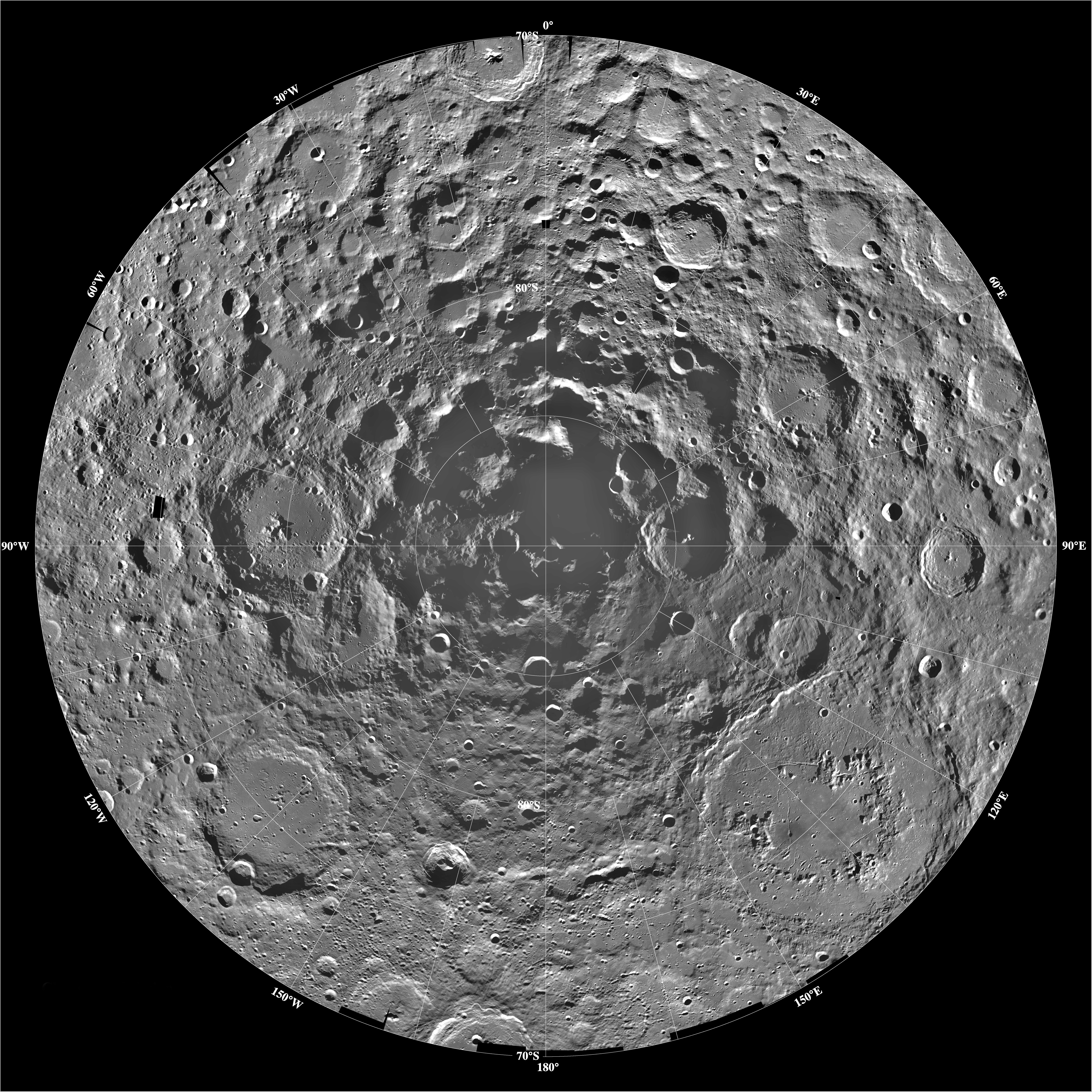 Mosaico lunare di ~1500 immagini del polo Sud della Luna